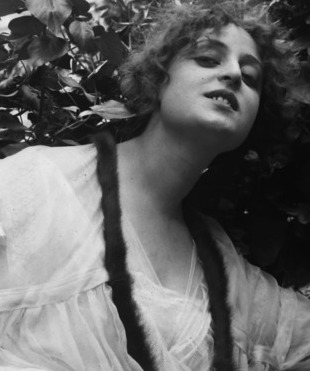 Attrice Pina Menichelli